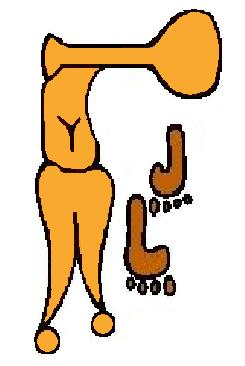 Escudo del municipio de Temoac, Morelos.